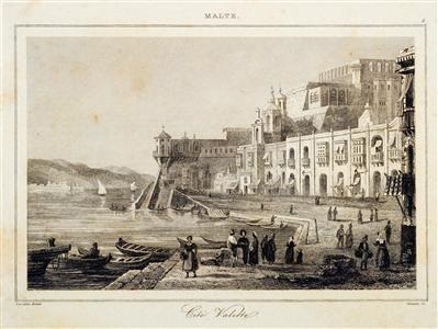 Vue de la cité de La Valette, île de Malte, par Augustin François Lemaître (1797-1870)